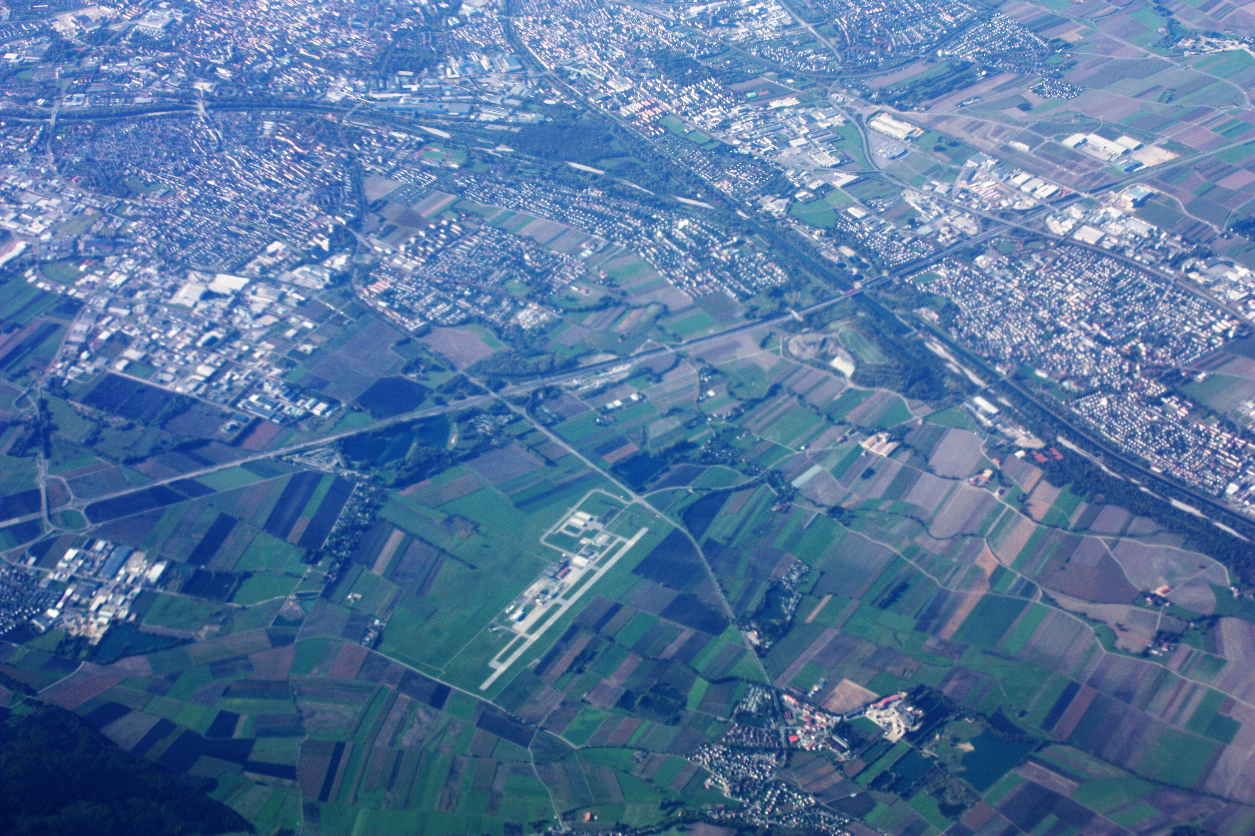 1 Flug von Frankfurt/Main nach Sofia; Start 10:12 MEZ; Landung 13:06 MEZ; Oktober 2010; Flughafen Augsburg; Bilckrichtung nach Süd-Süd-WEst